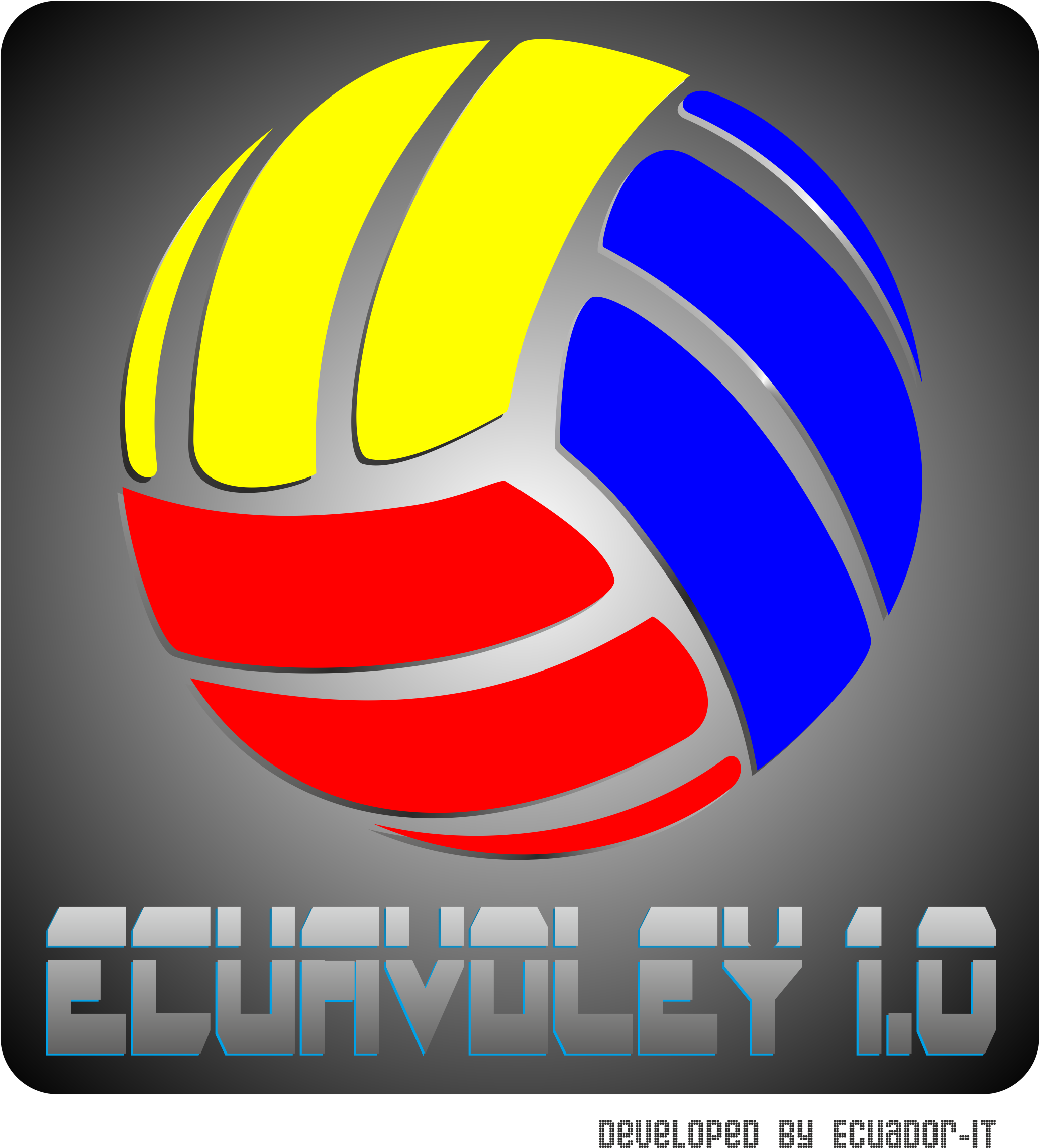 Ecuavoley 1.0 - en